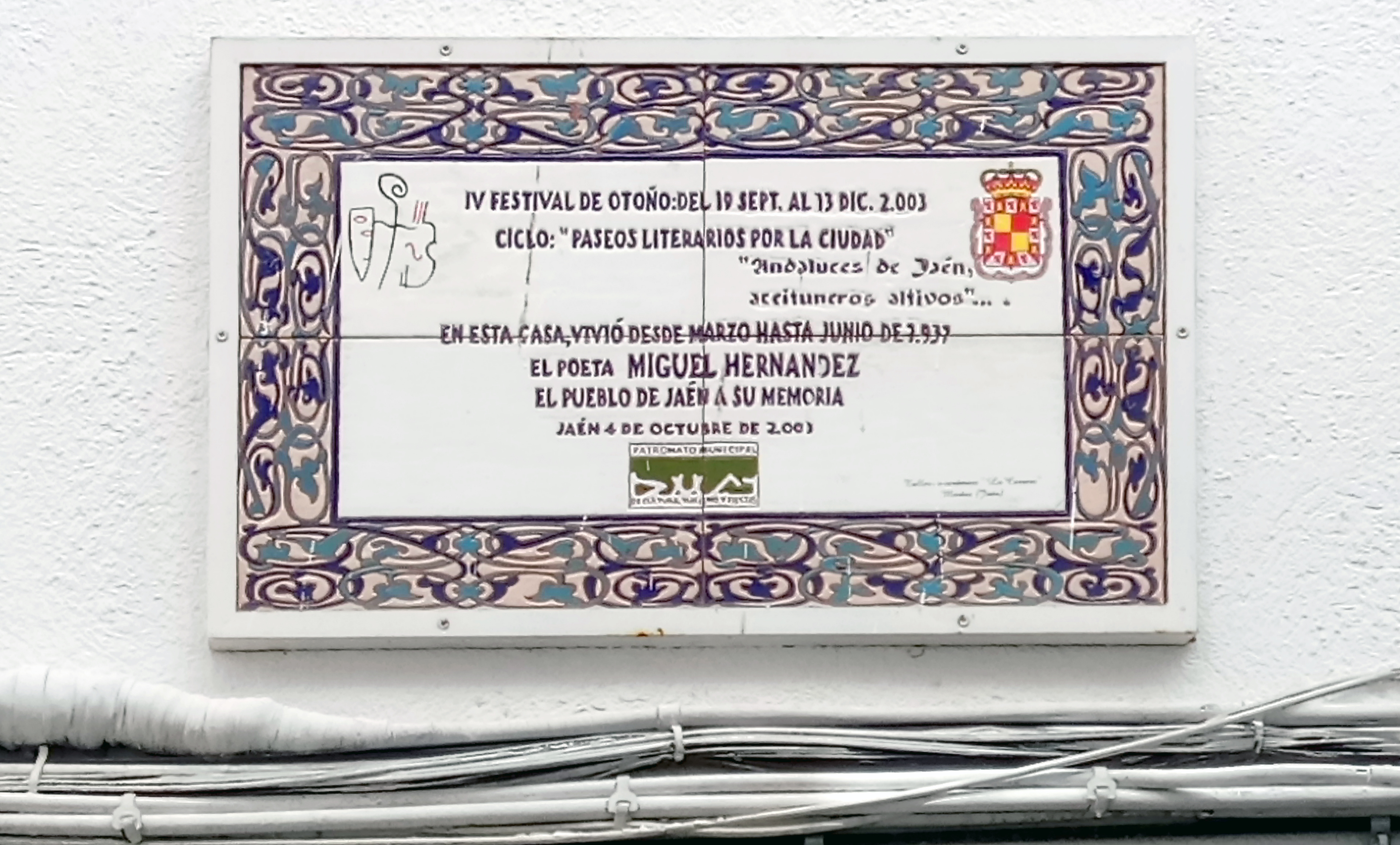 Placa conmemorativa de la estancia de Miguel Hernández en Jaén (marzo-junio de 1937), colocada en 2003 en la fachada de la casa n.º 9 de la calle Francisco Coello de la capital. Cámara Sony F3111.